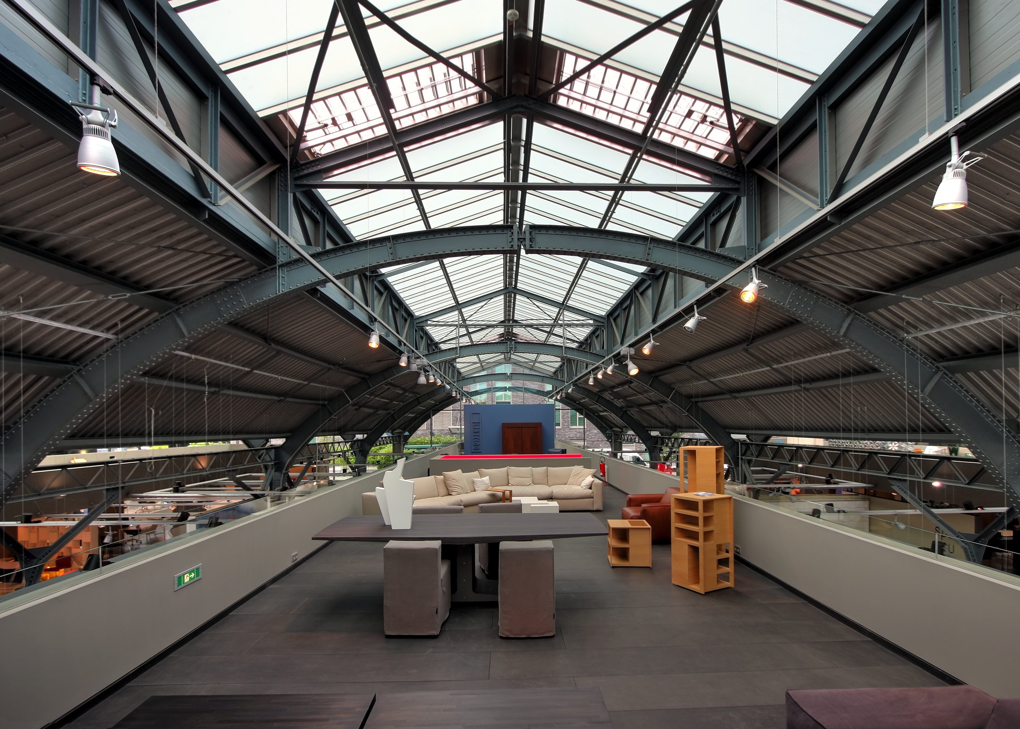 Innenaufnahme der Design Post, Köln-Deutz. Die Design-Post wurde 8-schiffige Dreigelenkbogenhalle gebaut und diente als Postbahnhofshalle.